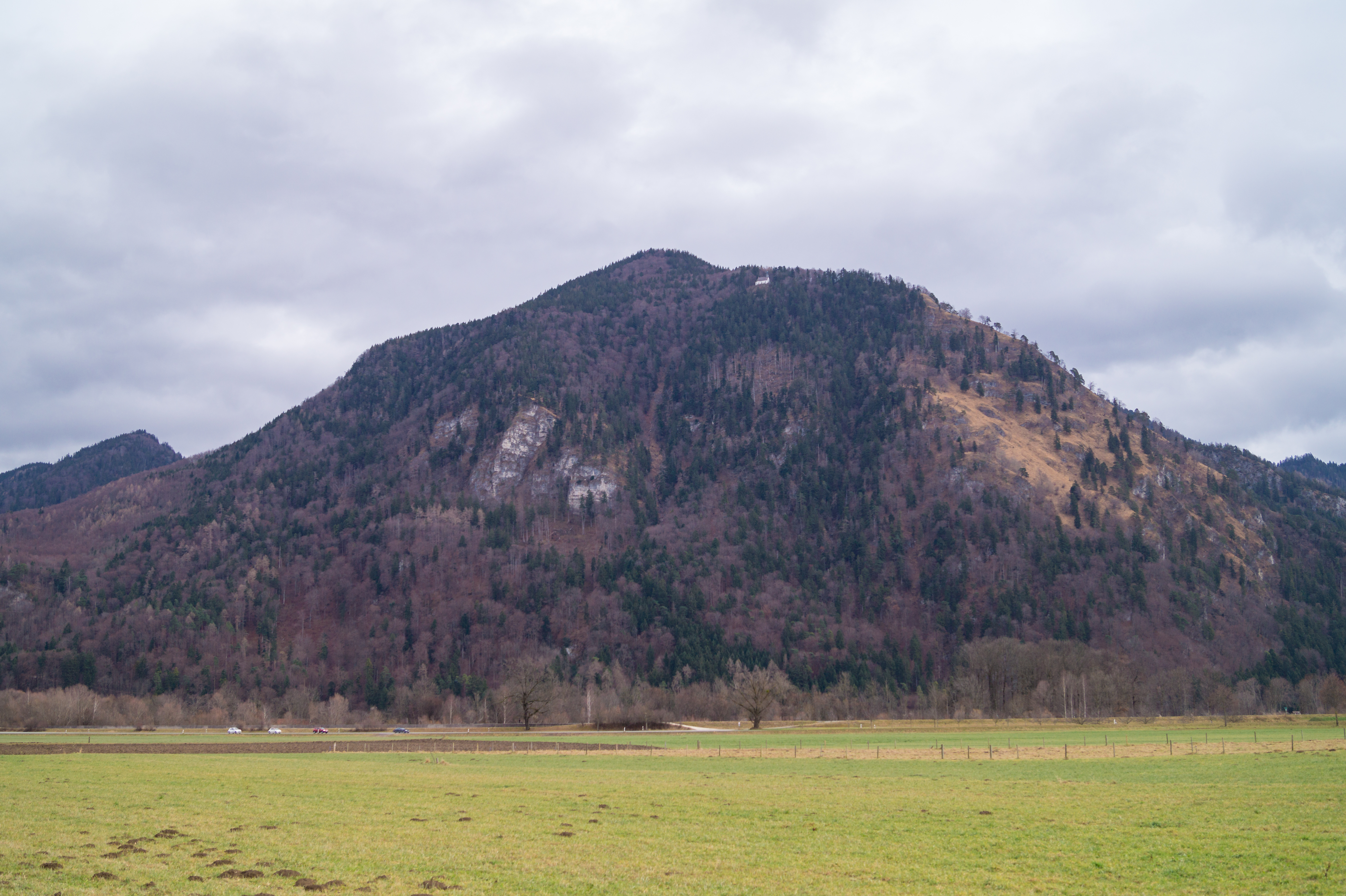 Der Schnappenberg bei Marquartstein von Westen.